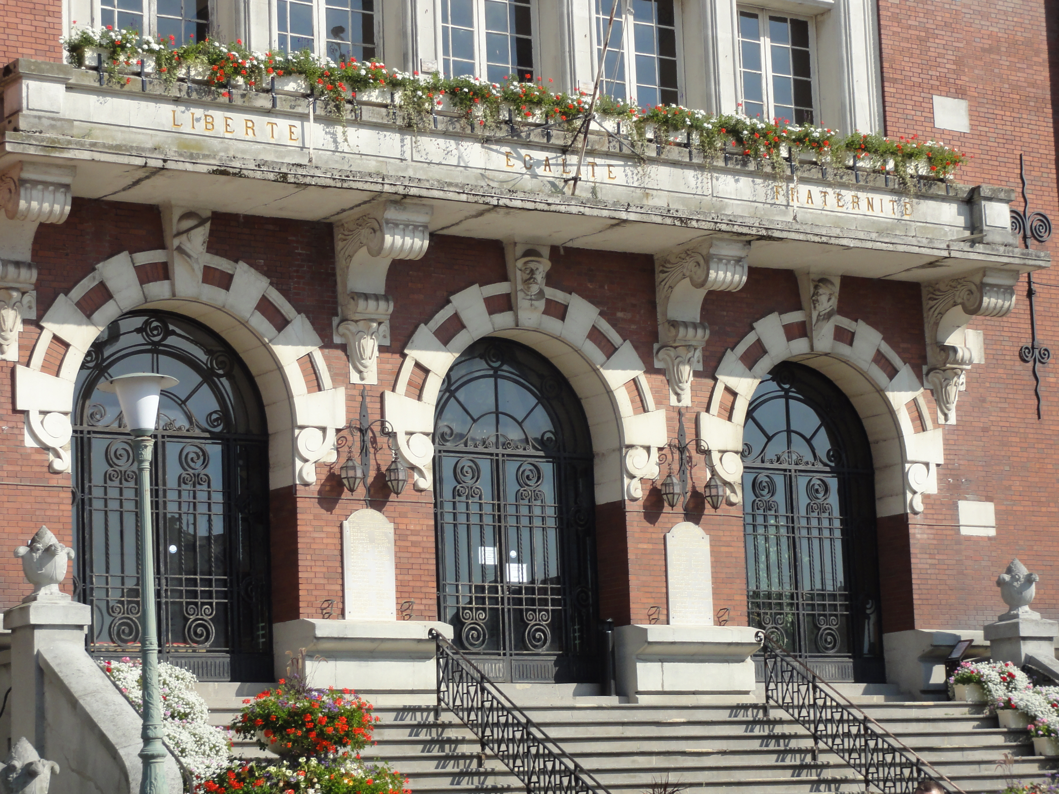 Hôtel de ville de Bruay-la-Buissière dans le bassin minier du Nord-Pas-de-Calais, Pas-de-Calais, Nord-Pas-de-Calais, France. .